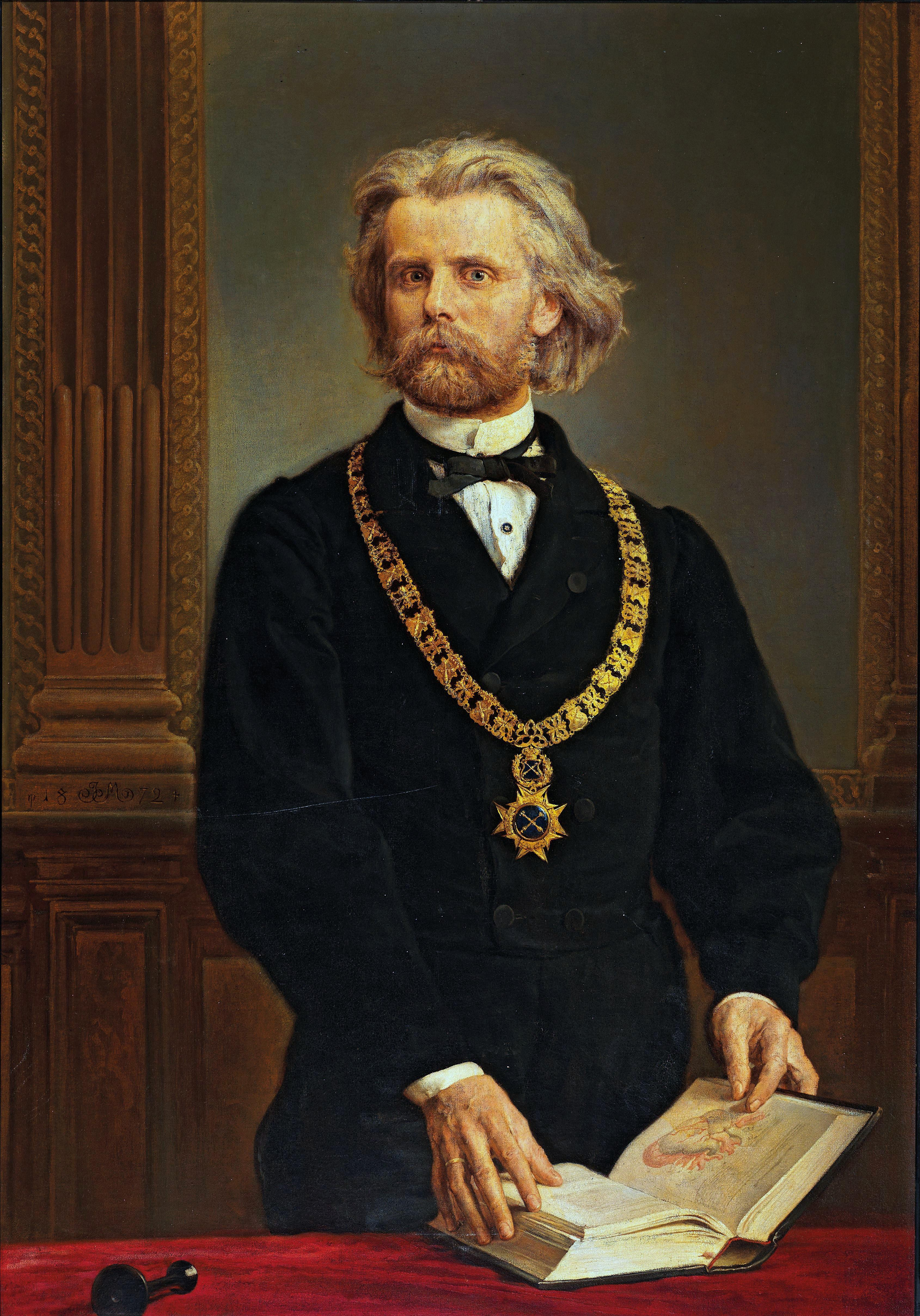 Portret chirurga Karola Gilewskiego (1832-1871) autorstwa Jana Matejki.